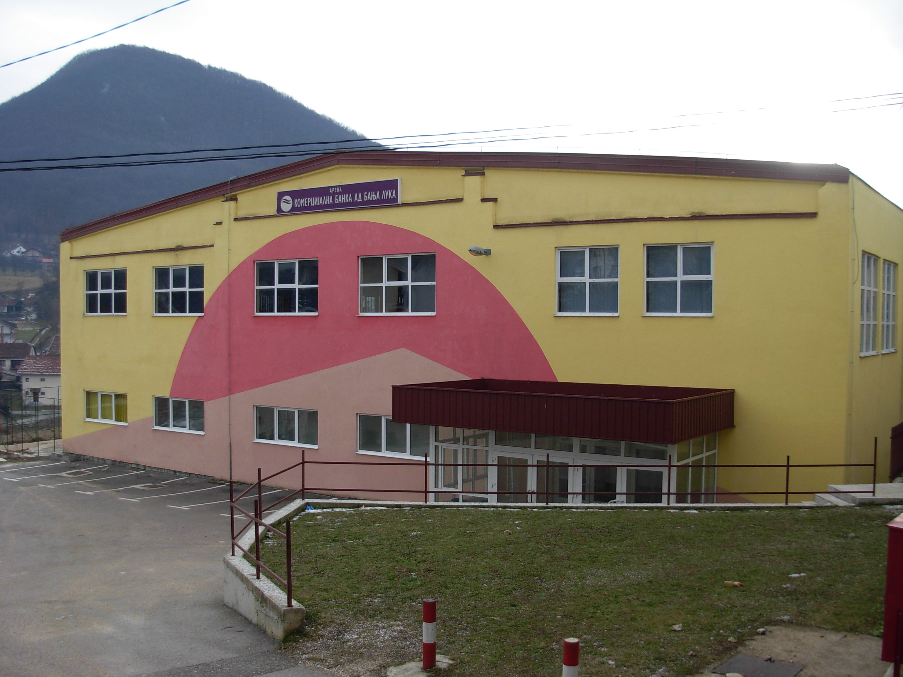 Sportska dvorana u Mrkonjić Gradu.